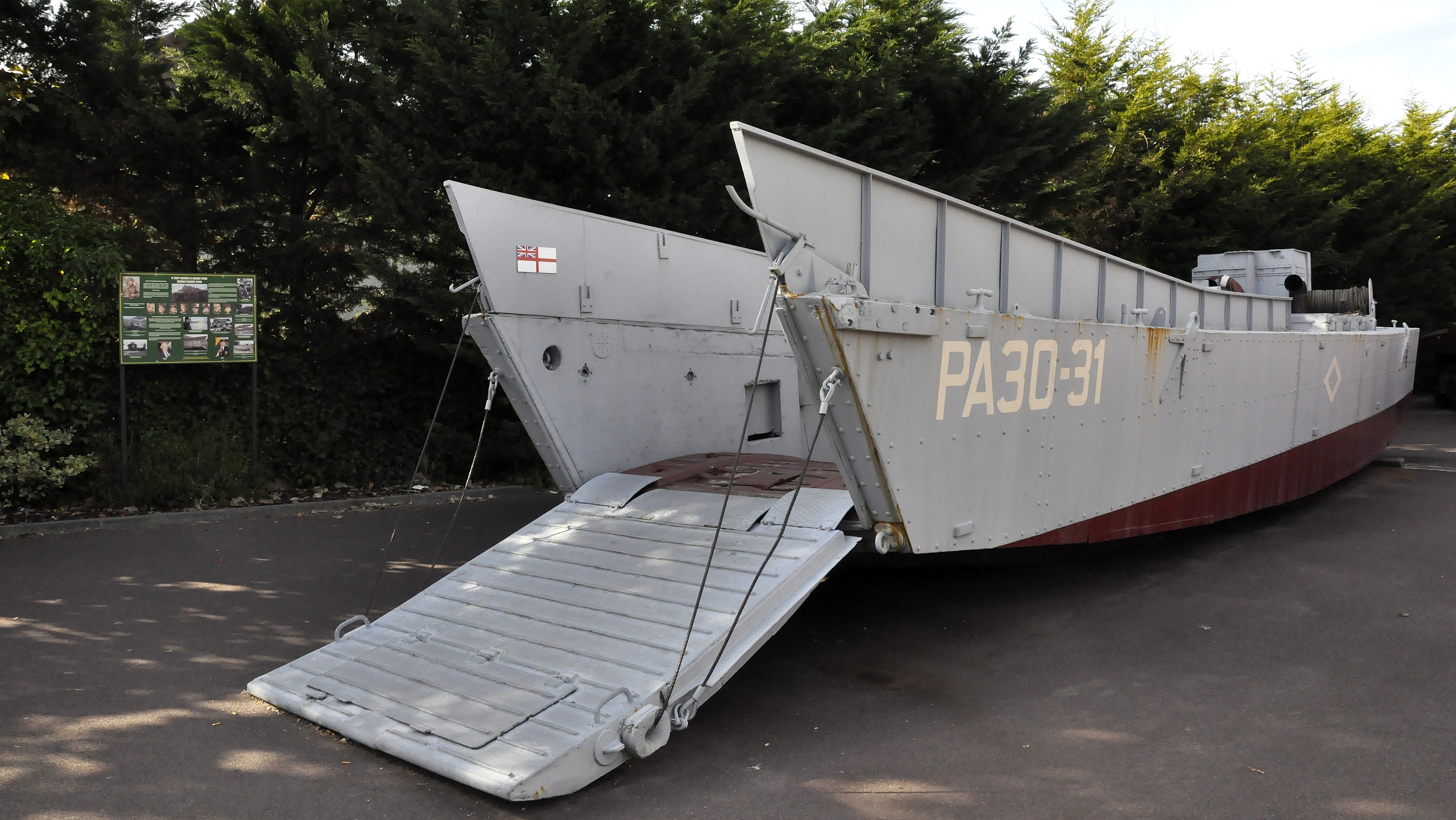 LCM PA30-31 voor het musée du Mur de l'Atlantique te Ouistreham. Dit originele, gerestaureerde vaartuig werd gebruikt tijdens de opnames van de film "Saving Private Ryan"